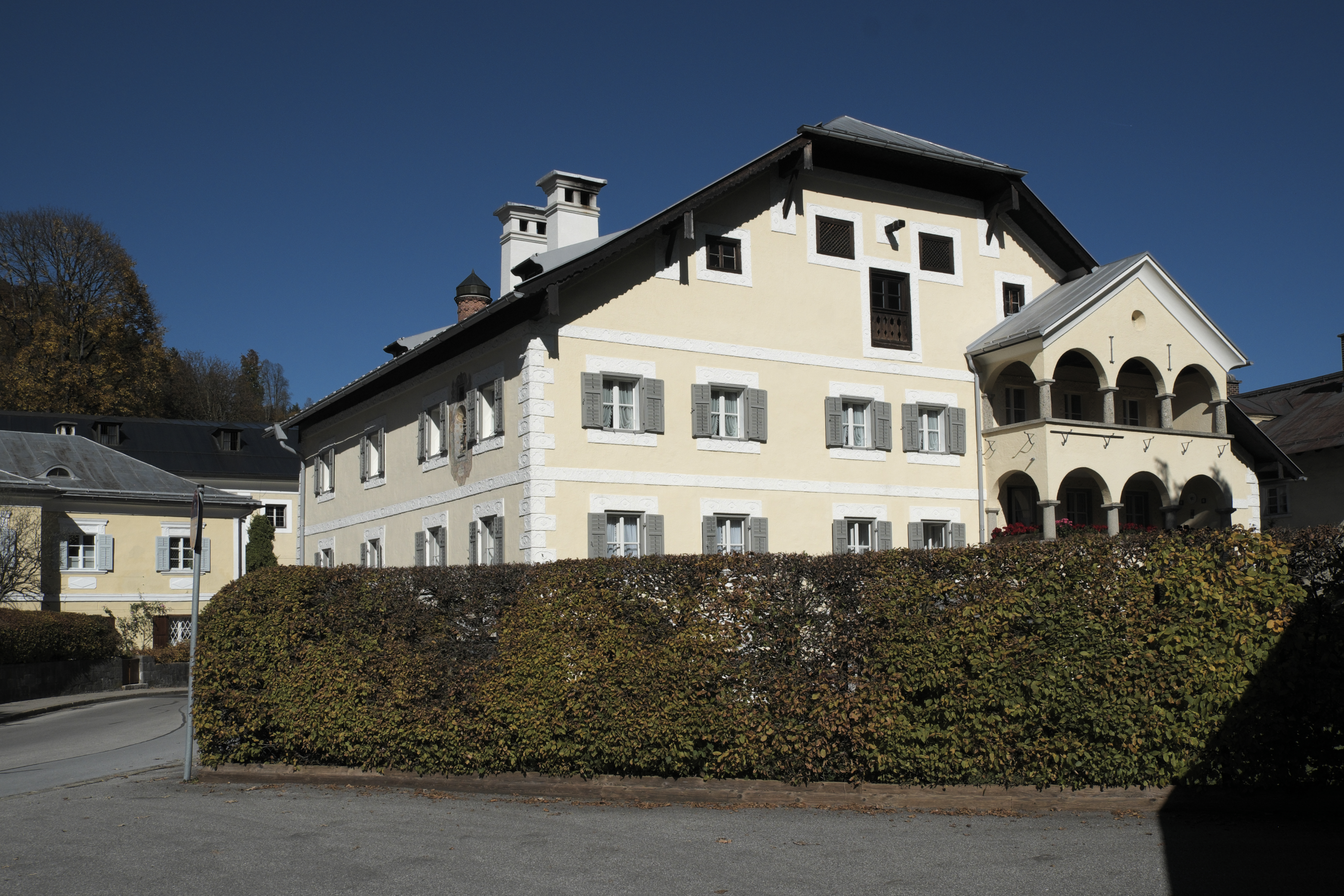 Ehemalige Pfister-Mühle, Bräuhausstraße 14, in Berchtesgaden im Landkreis Berchtesgadener Land (Bayern/Deutschland)